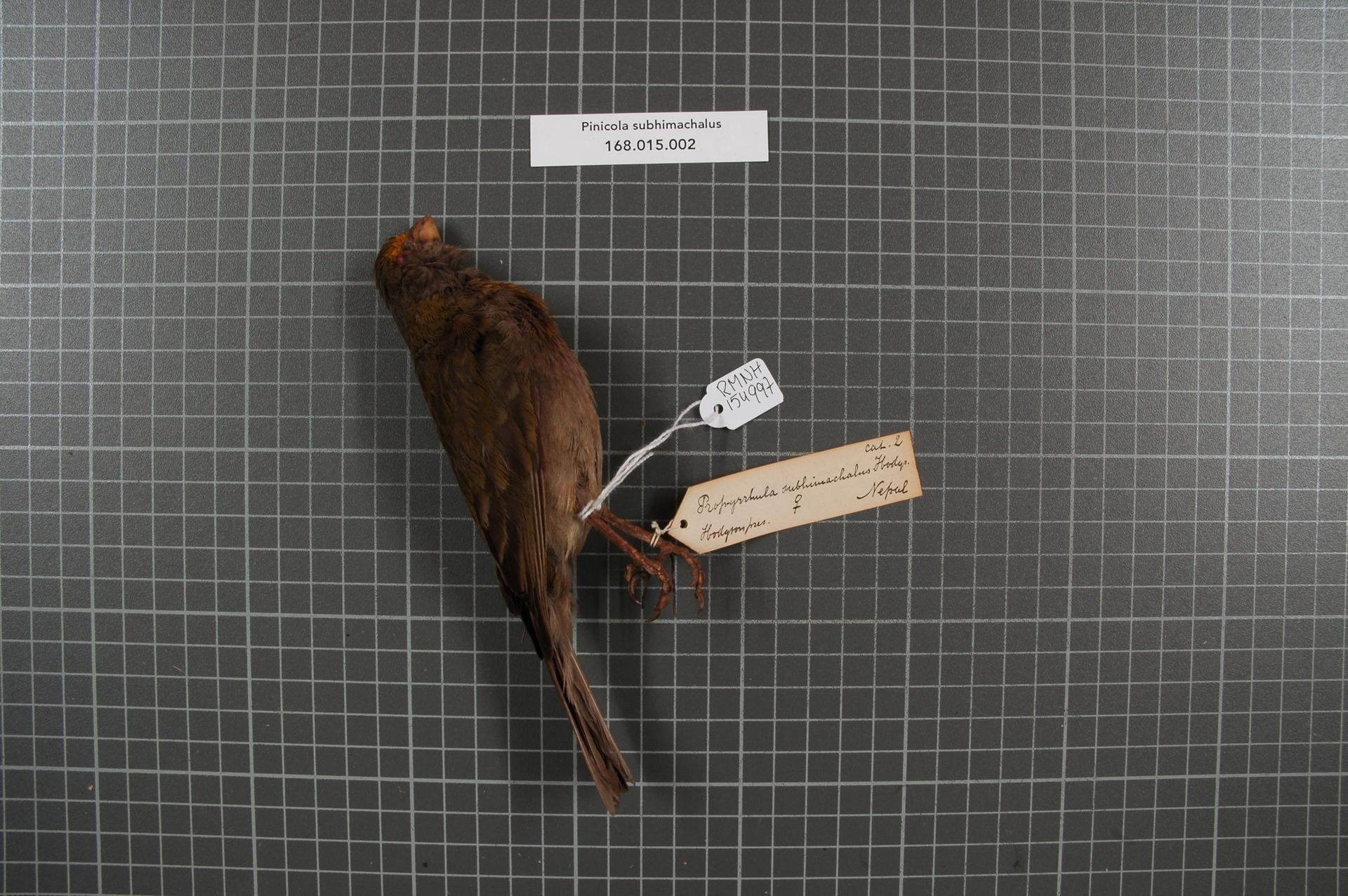 Pinicola subhimachalus (Hodgson, 1836)